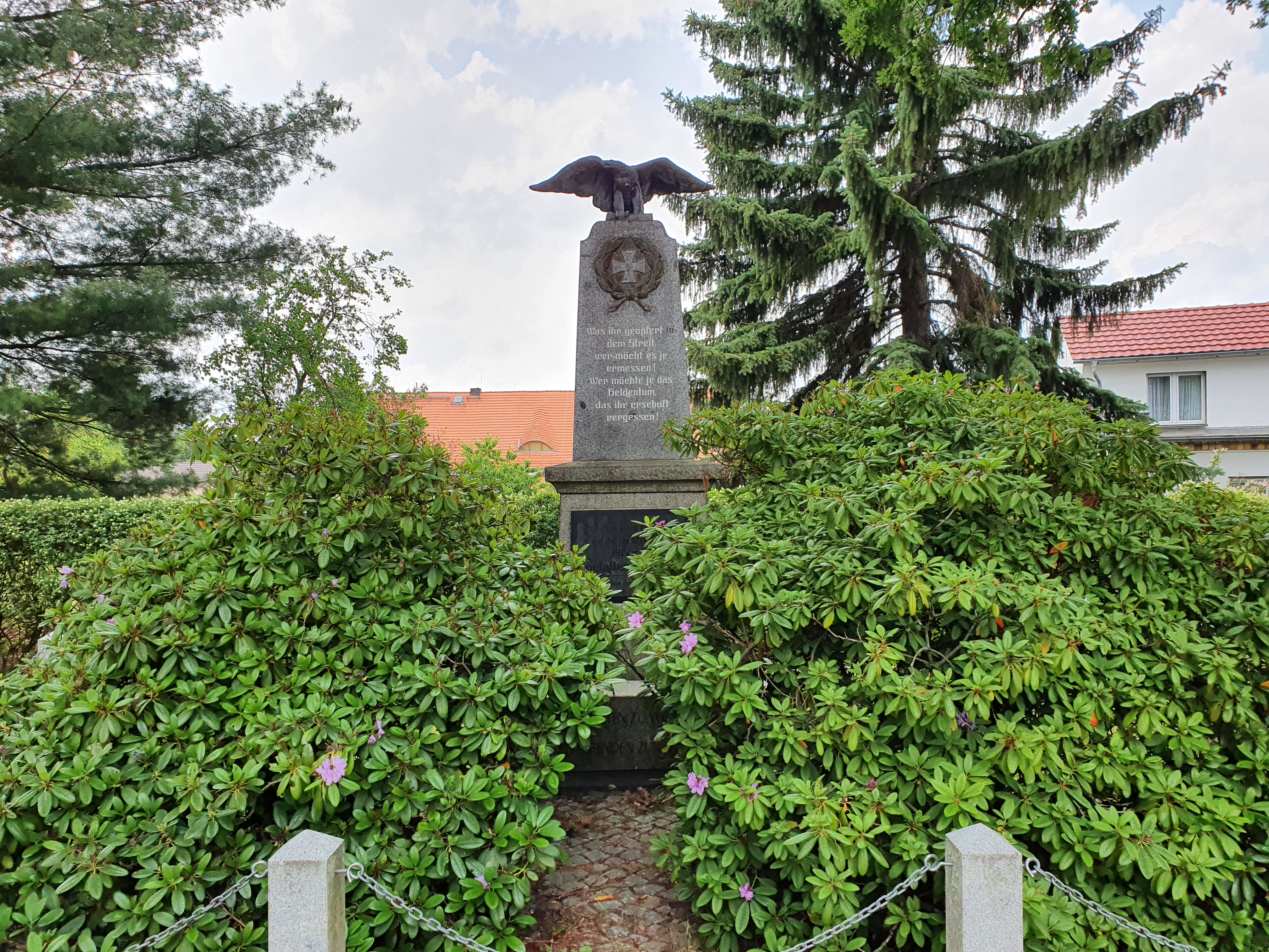 Gefallenendenkmal im historischen Ortszentrum von Limberg im Landkreis Spree-Neiße, Brandenburg.